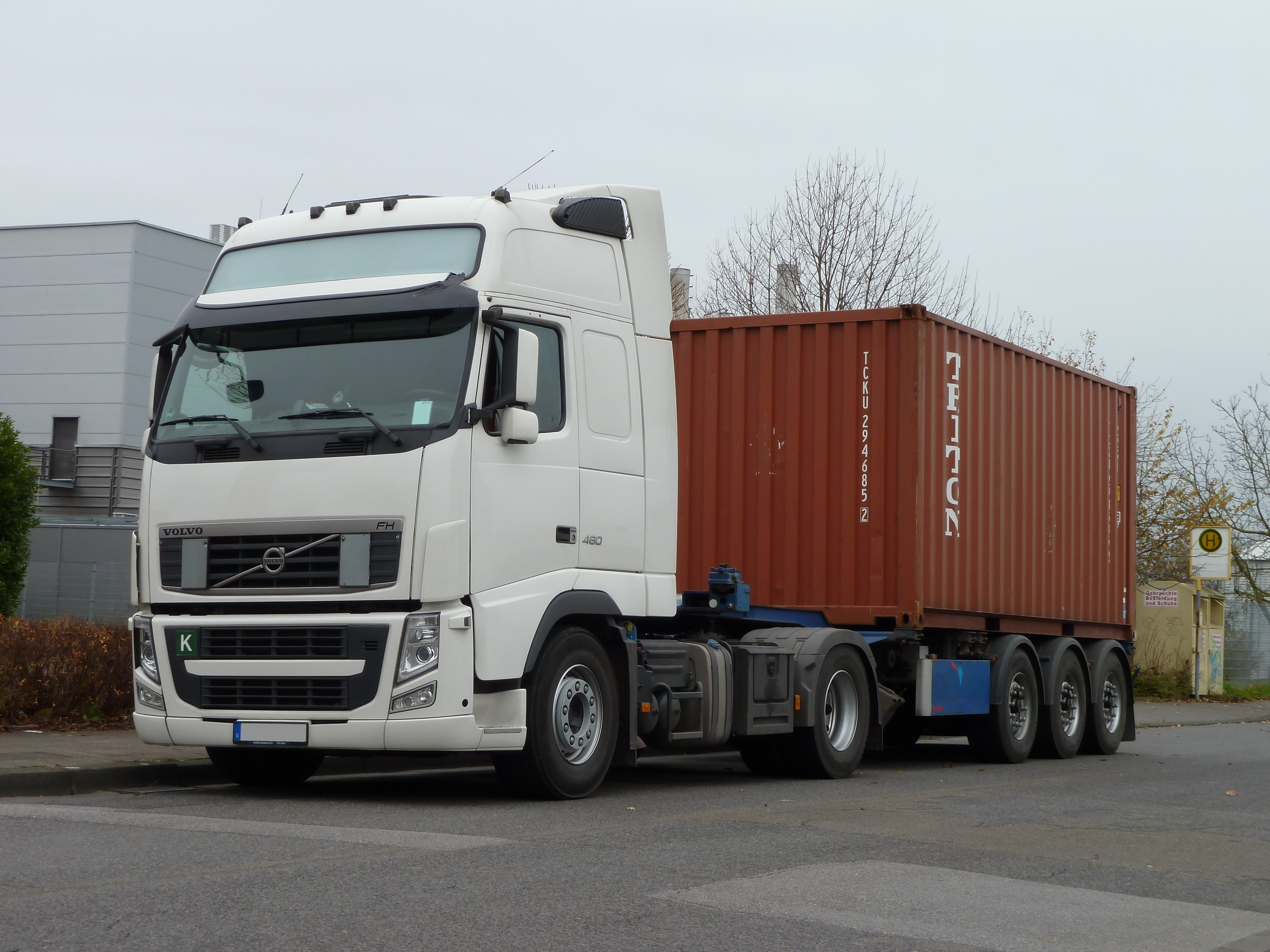 Volvo FH Modell 2008 20ft-Containersattelzug